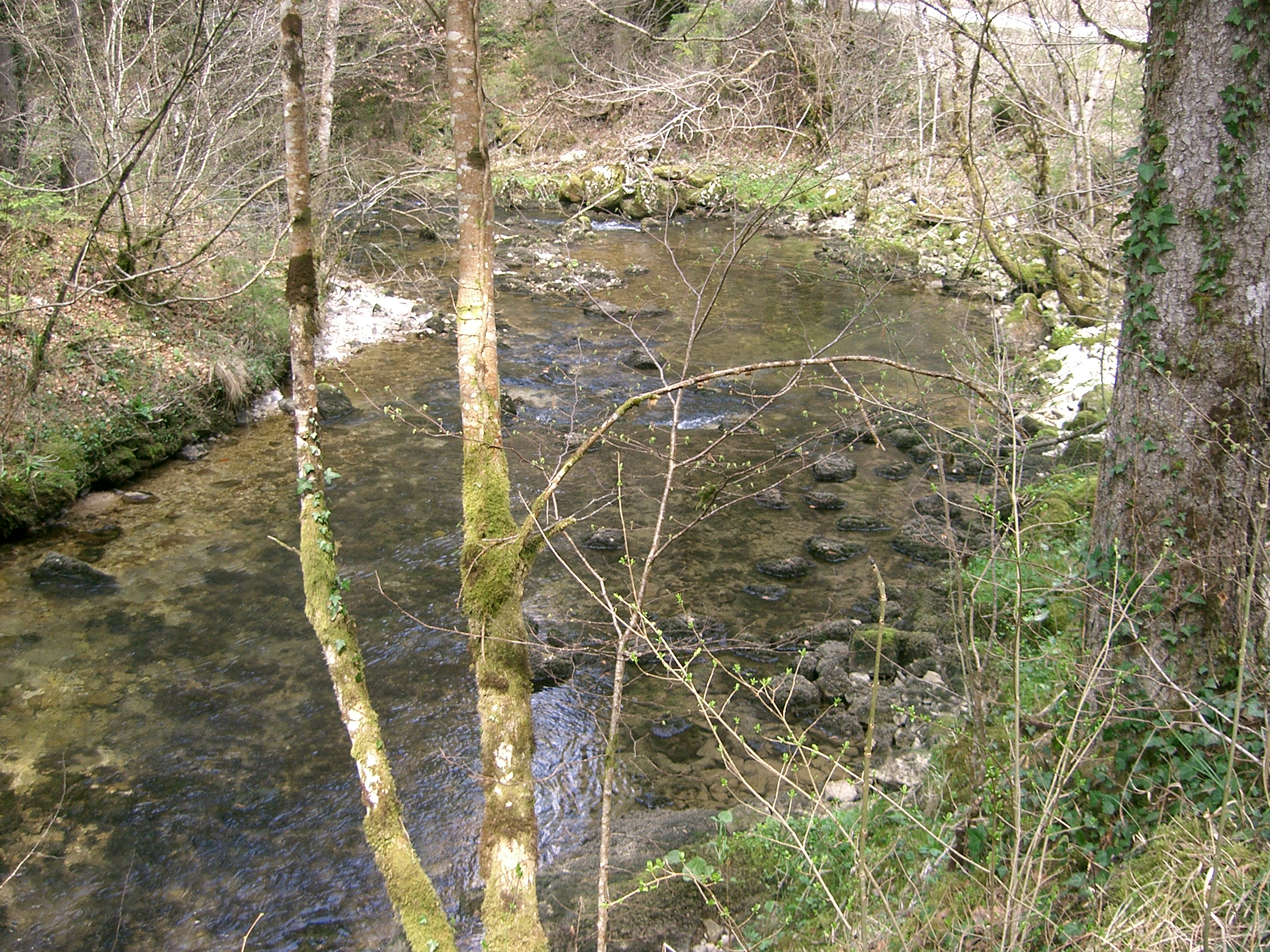 La Balerne près de l'ancienne abbaye de Balerne (Jura- France)